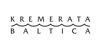 Logo des Kammerorchesters Kremerata Baltika